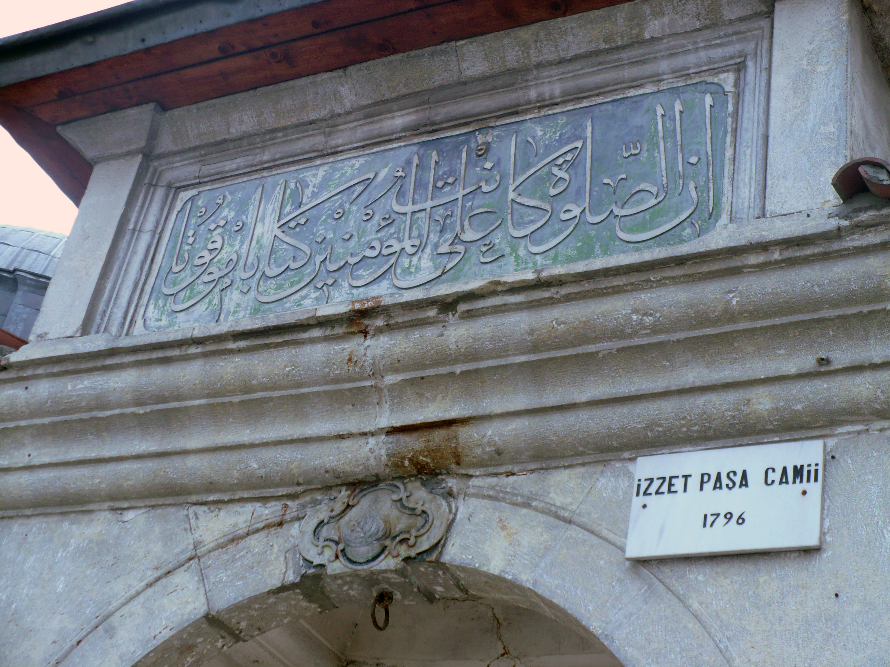 İzzet Paşa Camii 1796/Safranbolu